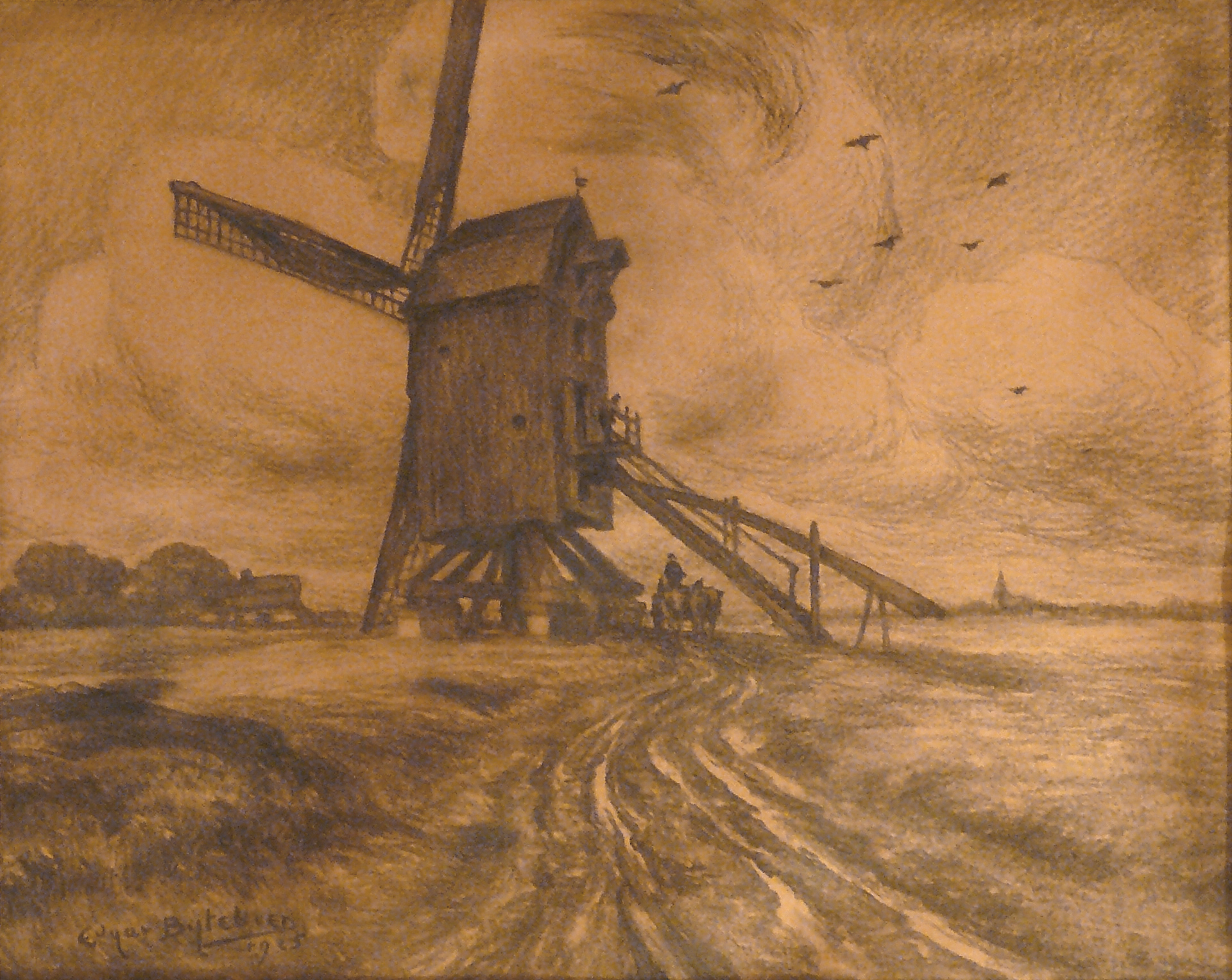 Bytebier E. - Charcoal - Moulin à vent dans le Brabant - 48x60cm; ce dessin est daté de 1925.